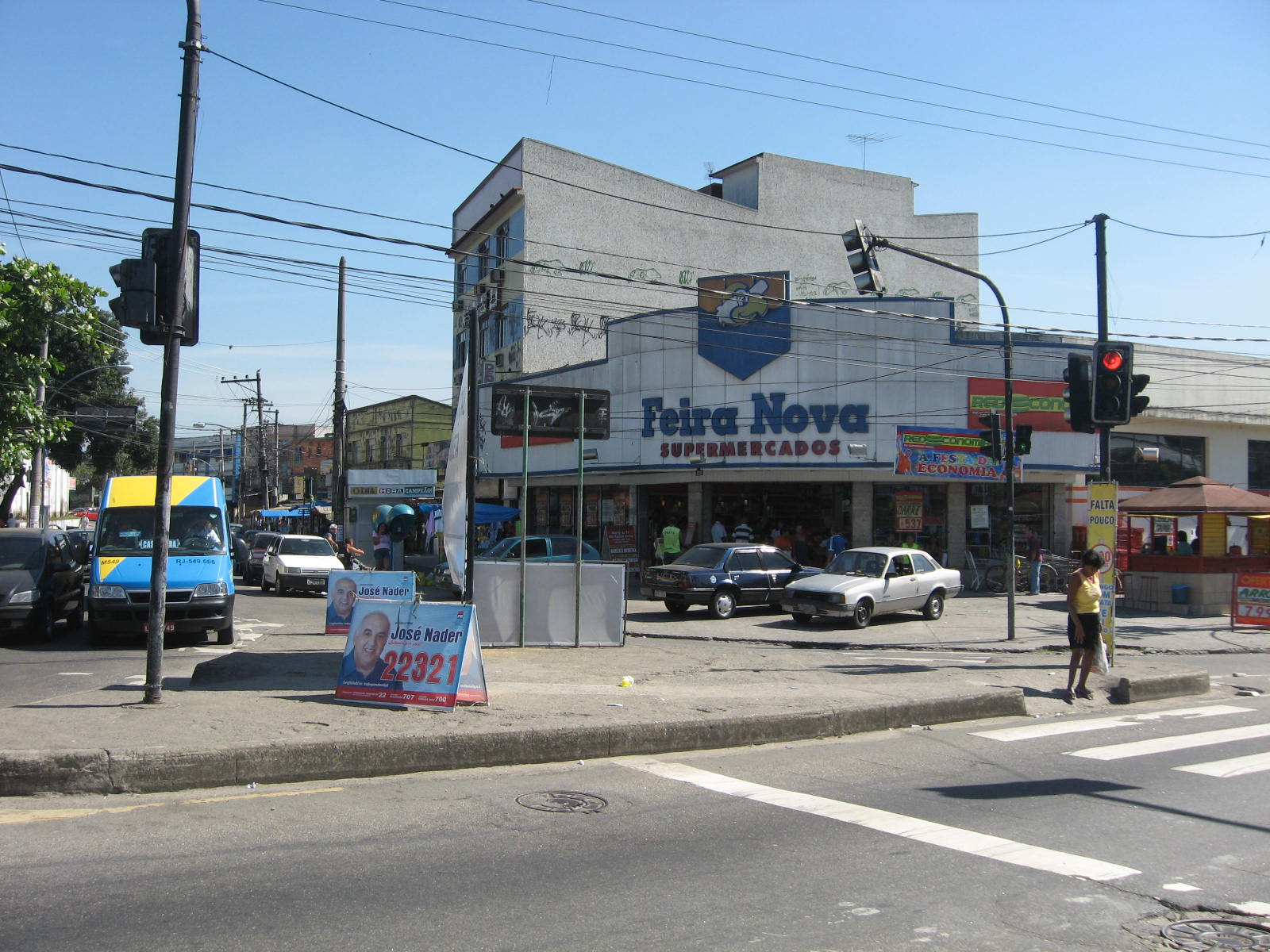 Vista do bairro de Anchieta, localizado na zona norte do Rio de Janeiro.